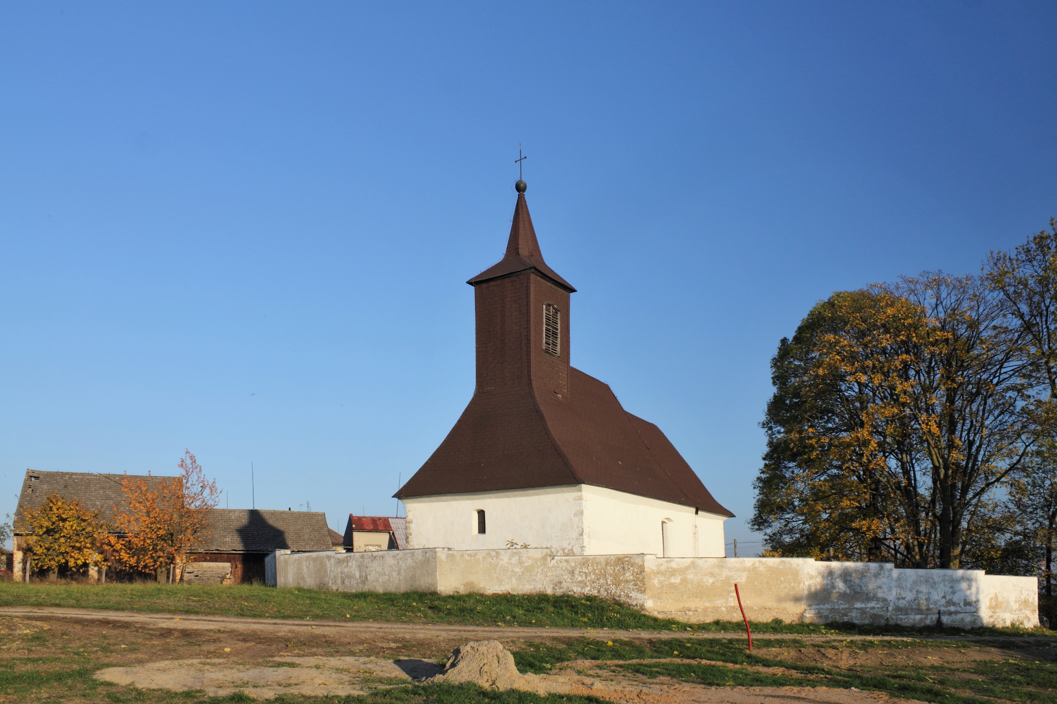 Chocnějovice